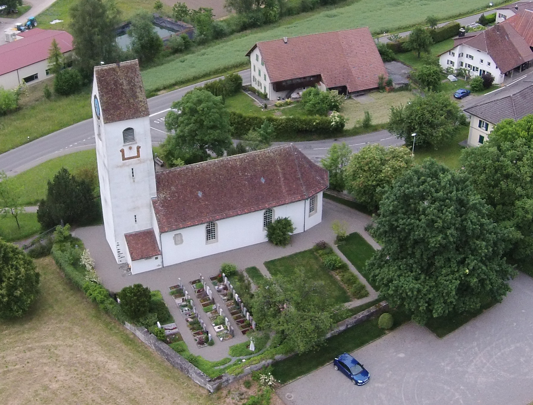 Blick auf die reformierte Kirche Ammerswil